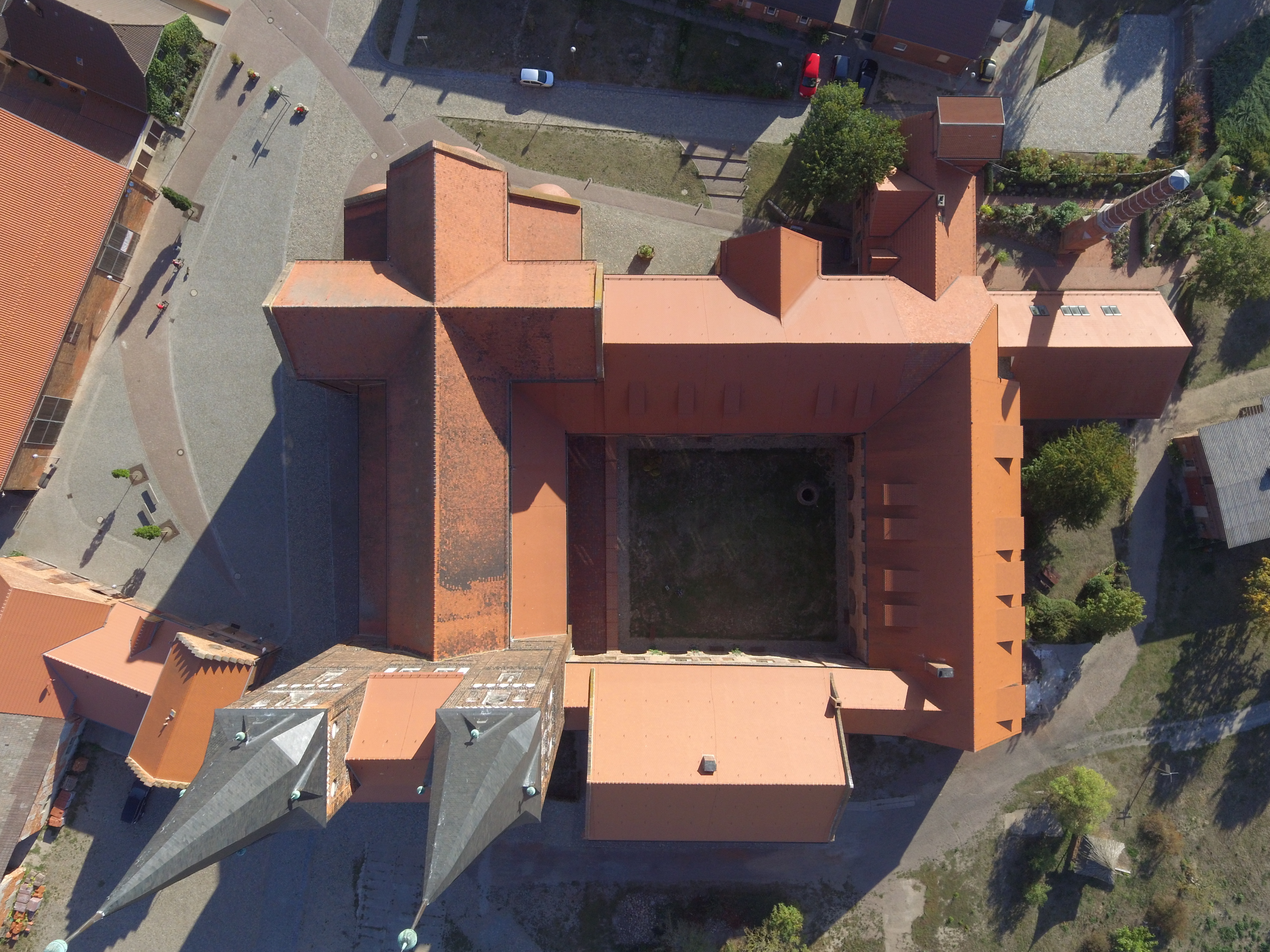 Draufsicht auf Klosterkirche Jerichow, Kosterhof mit Kreuzgang und Nebengebäuden